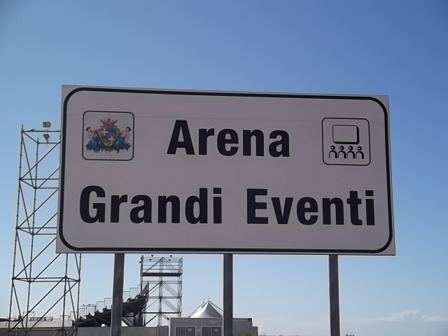 Cartello di entrata nell'arena sant'elia